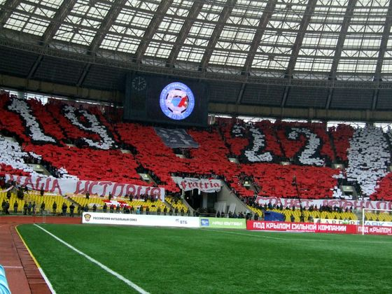 Перфоманс "1922" на матче с ЦСКА. 2007 год